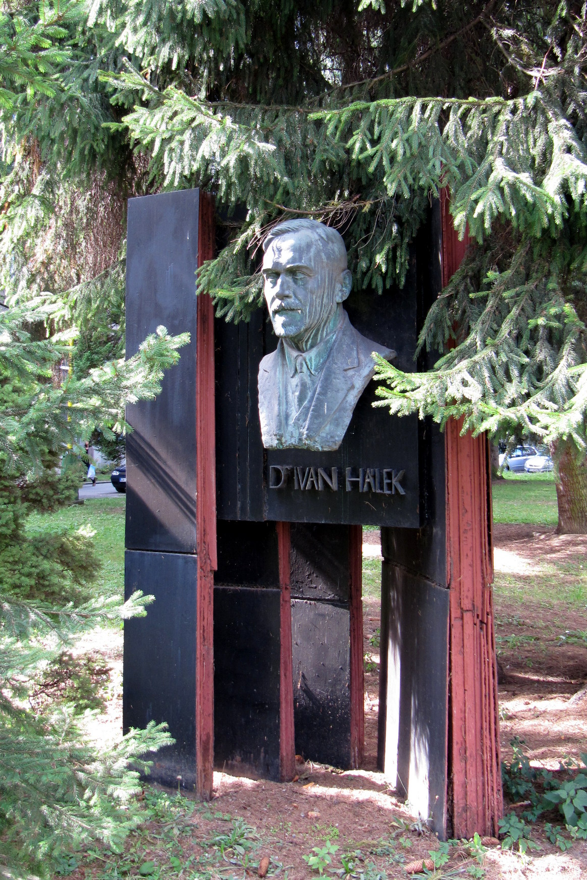 POMNÍK S BUSTOU, MUDr. Ivan Hálek (1872-1945), lekár, publicista